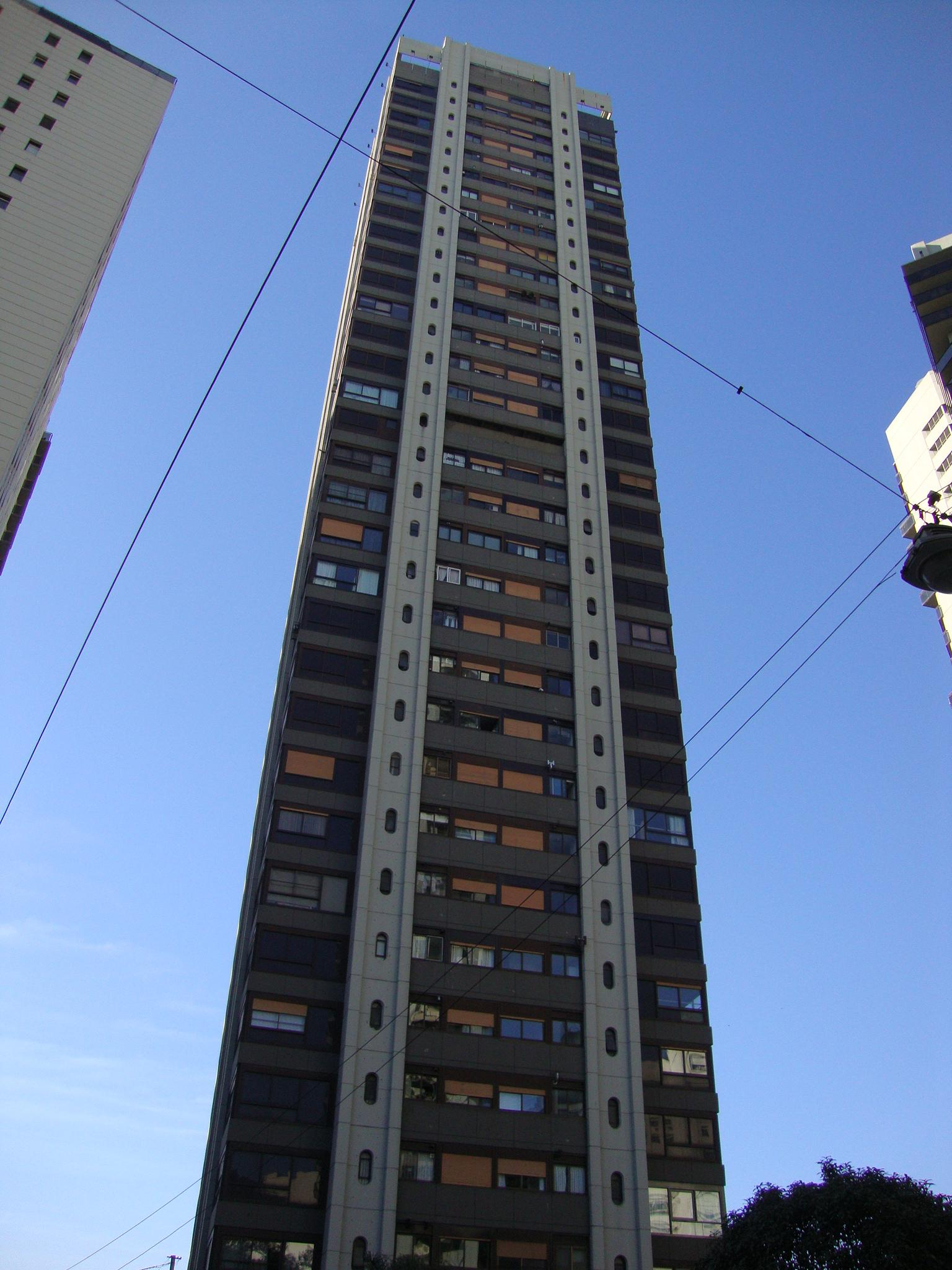 Vista de la Torre Libertador 380, desde la barranca de la calle Suipacha. Buenos Aires, Argentina.